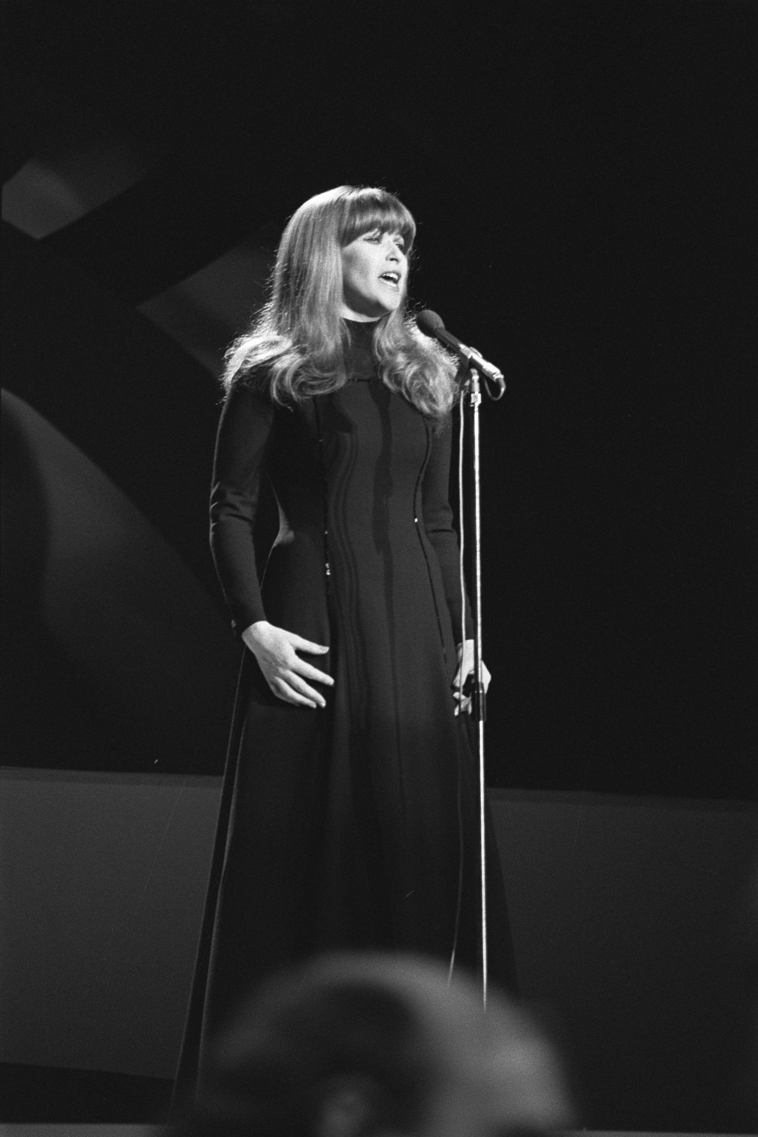 Collectie / Archief : Fotocollectie Anefo Reportage / Serie : [ onbekend ] Beschrijving : Songfestival; 19, 20: Rita Hovink Datum : 2 februari 1977 Trefwoorden : Songfestivals Fotograaf : Suyk, Koen / Anefo Auteursrechthebbende : Nationaal Archief Materiaalsoort : Negatief (zwart/wit) Nummer archiefinventaris : bekijk toegang 2.24.01.05 Bestanddeelnummer : 929-0095 Reacties Geplaatst door Musiclady op 12 juli 2016 - 18:20. Nationale finale Songfestival. Rita Hovink zingt: 'Toen kwam jij'. Locatie: Congresgebouw Plaats: Den Haag, Zuid-Holland